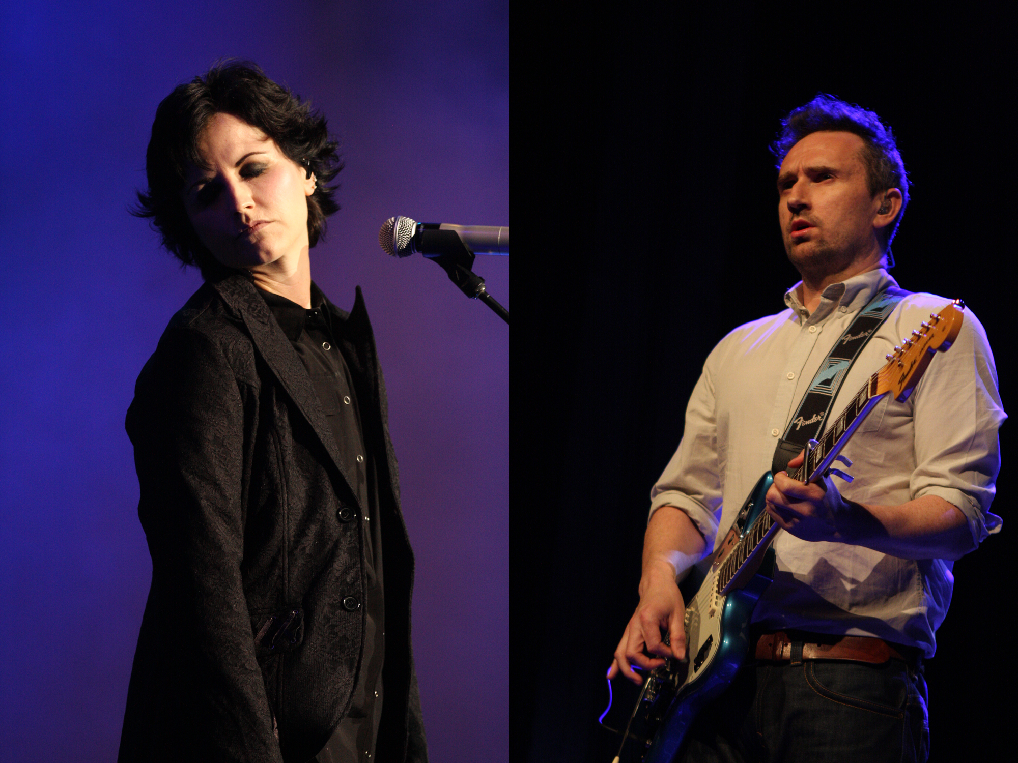 Fotomontaje del grupo The Cranberries usando material del año 2010 de Eva Rinaldi (fotógrafa).